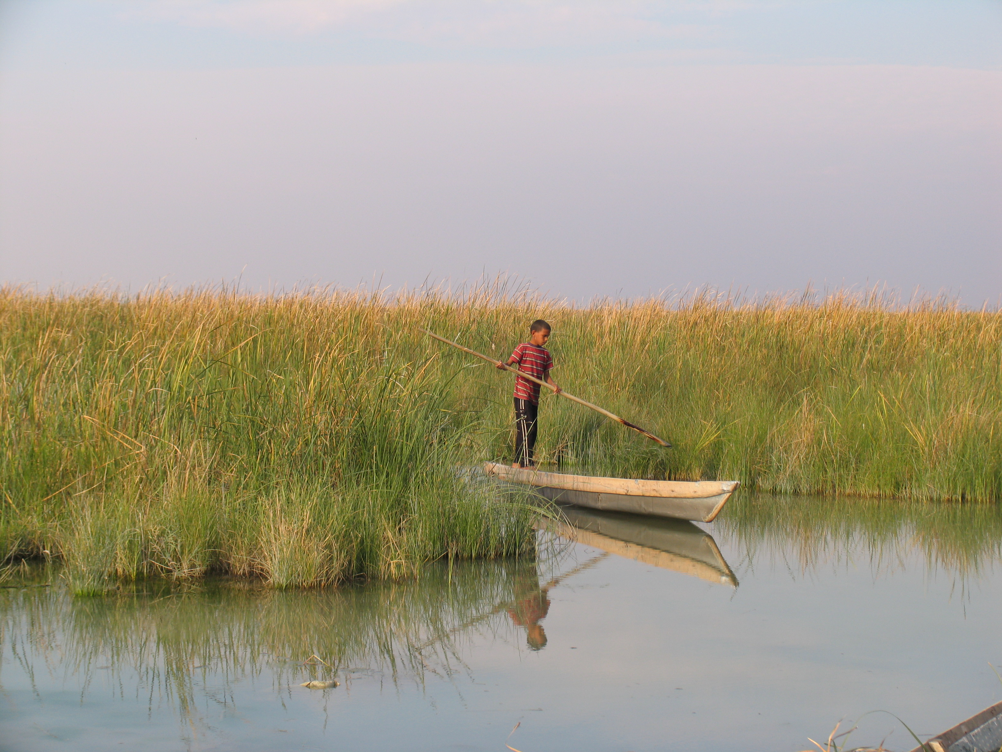 talabe shadegan